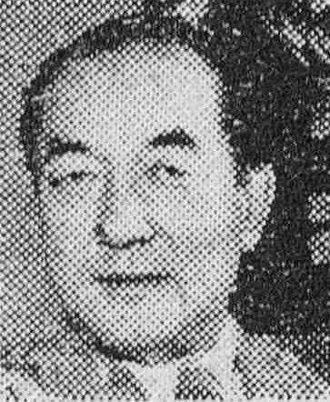 早川雪洲 （Sessue Hayakawa）